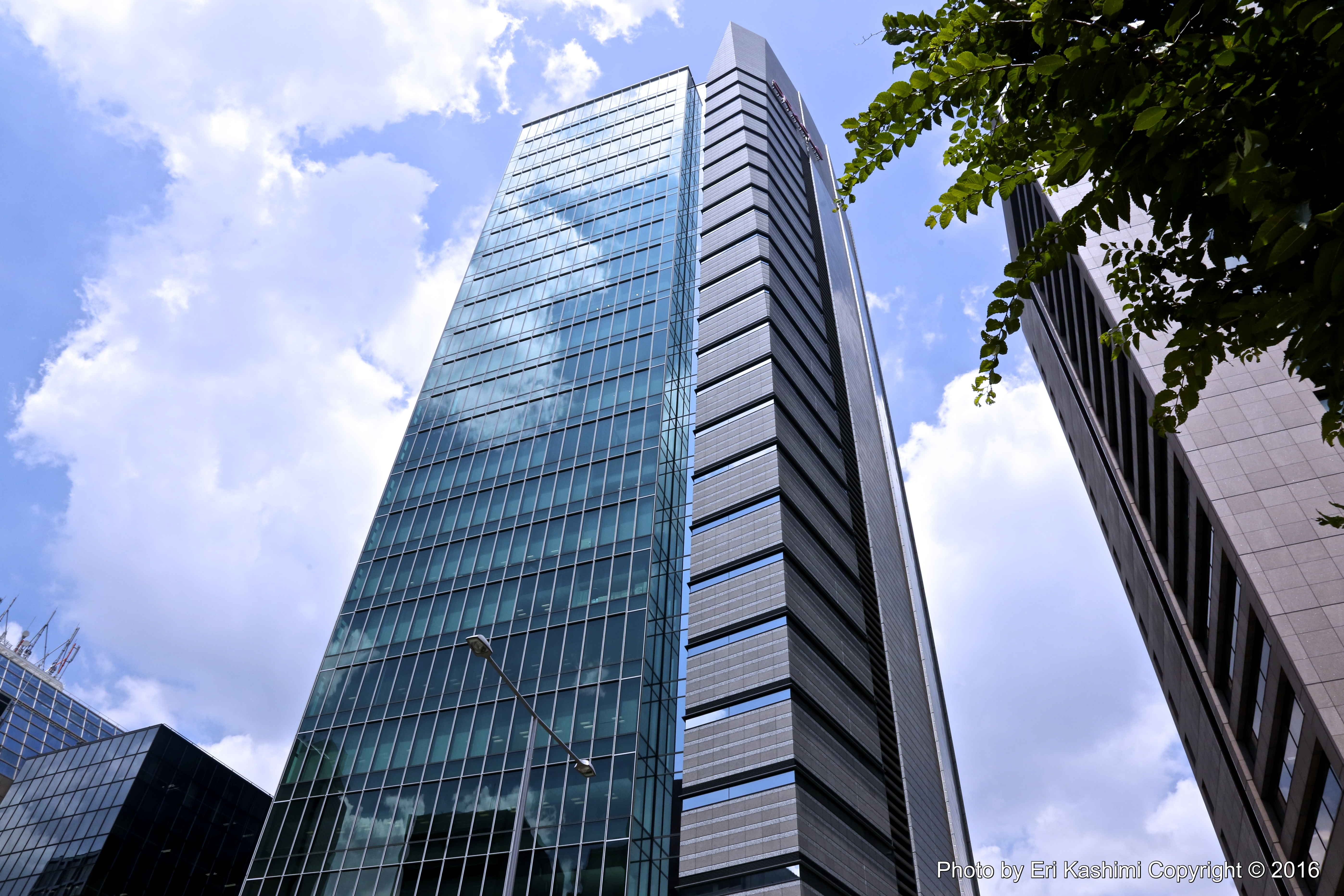 2015/7/24 Oracle Aoyama Center